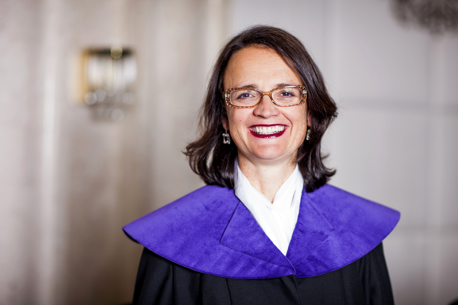 Dr. Sieglinde Gahleitner, Mitglied des österreichischen Verfassungsgerichtshofs seit 2010.